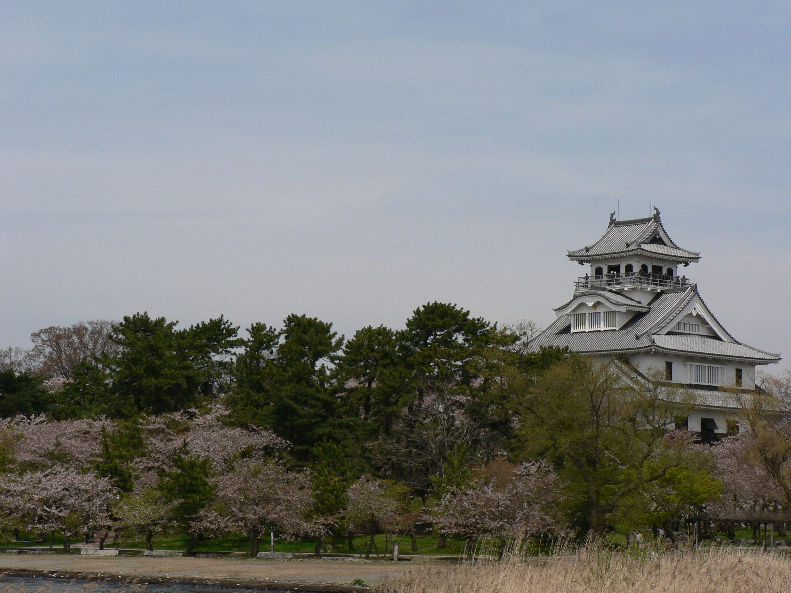 Chateau de Nagahama. Nagahama Castle.